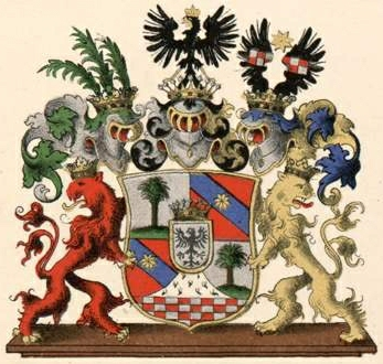 Keyserlingki suguvõsa krahvivapp (Preisimaa)